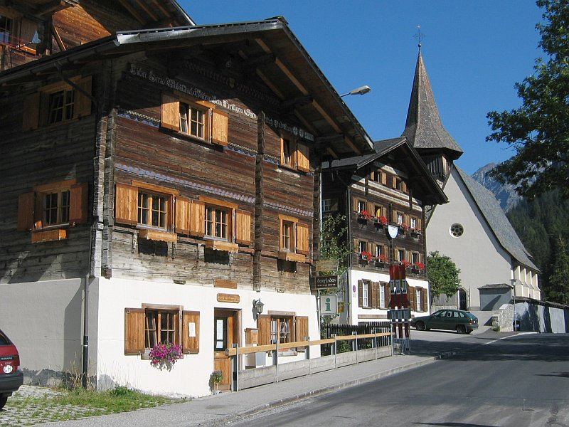 Langwies (CH-GR)